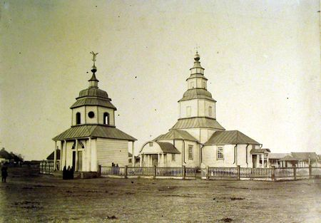 Церква с. Перещепине, Новомосковського р-ну, Дніпропетровщина